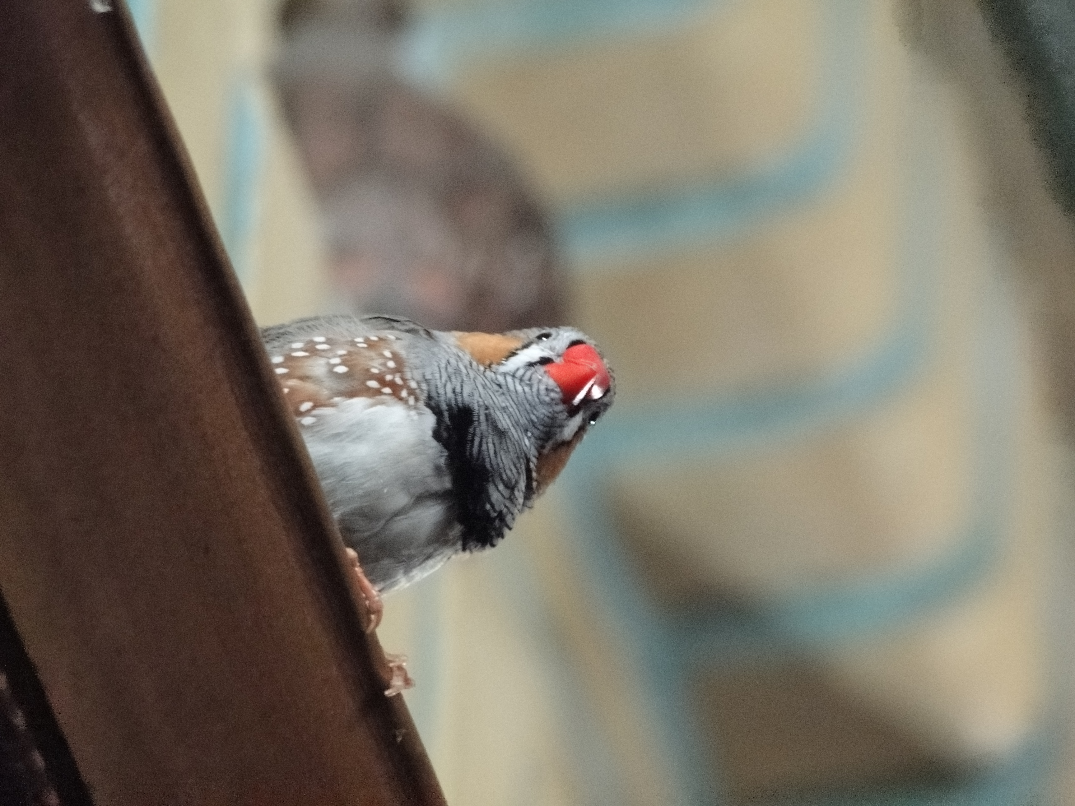 مجاورت با انسان